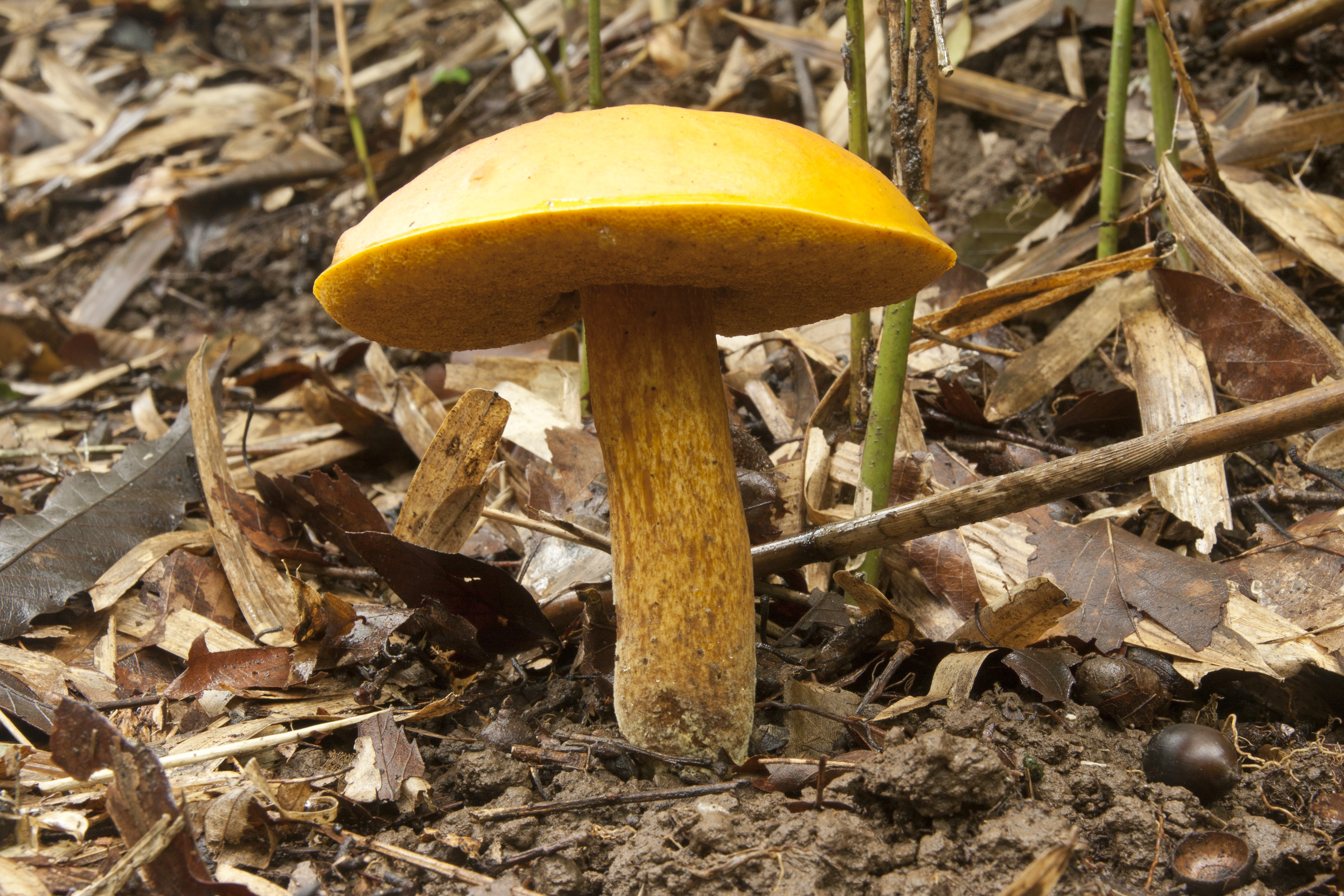 コガネヤマドリ (学名:Boletus aurantiosplendens)